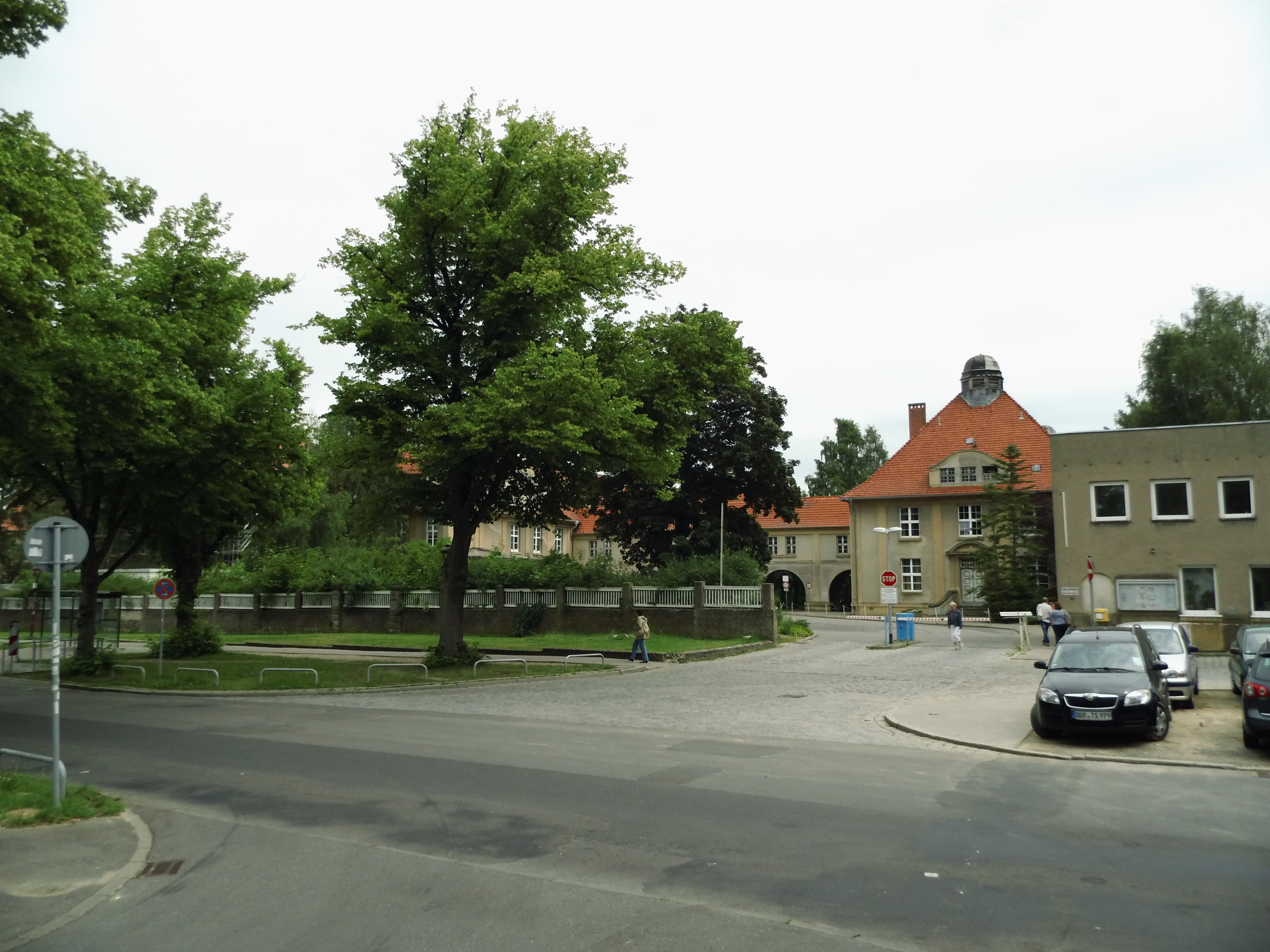 Das Universitätsklinikum Rostock, fotograffiert vom Eingang an der Schillingallee, vor den Umbauarbeiten.